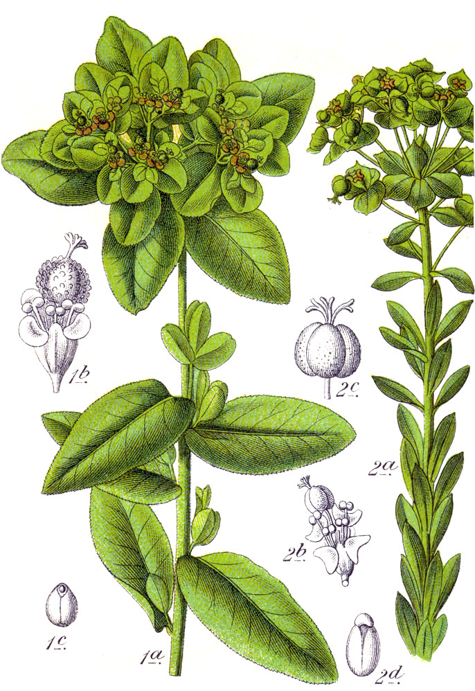 1. Euphorbia flavicoma subsp. verrucosa (Fiori) Pignatti, syn. Euphorbia verrucosa L. 2. Euphorbia seguieriana subsp. seguieriana, syn. Euphorbia gerardiana Jacq. Original Caption 1. Warzige Wolfsmilch, Euphorbia verrucosa 2. Gerard-Wolfsmilch, E. gerardiana